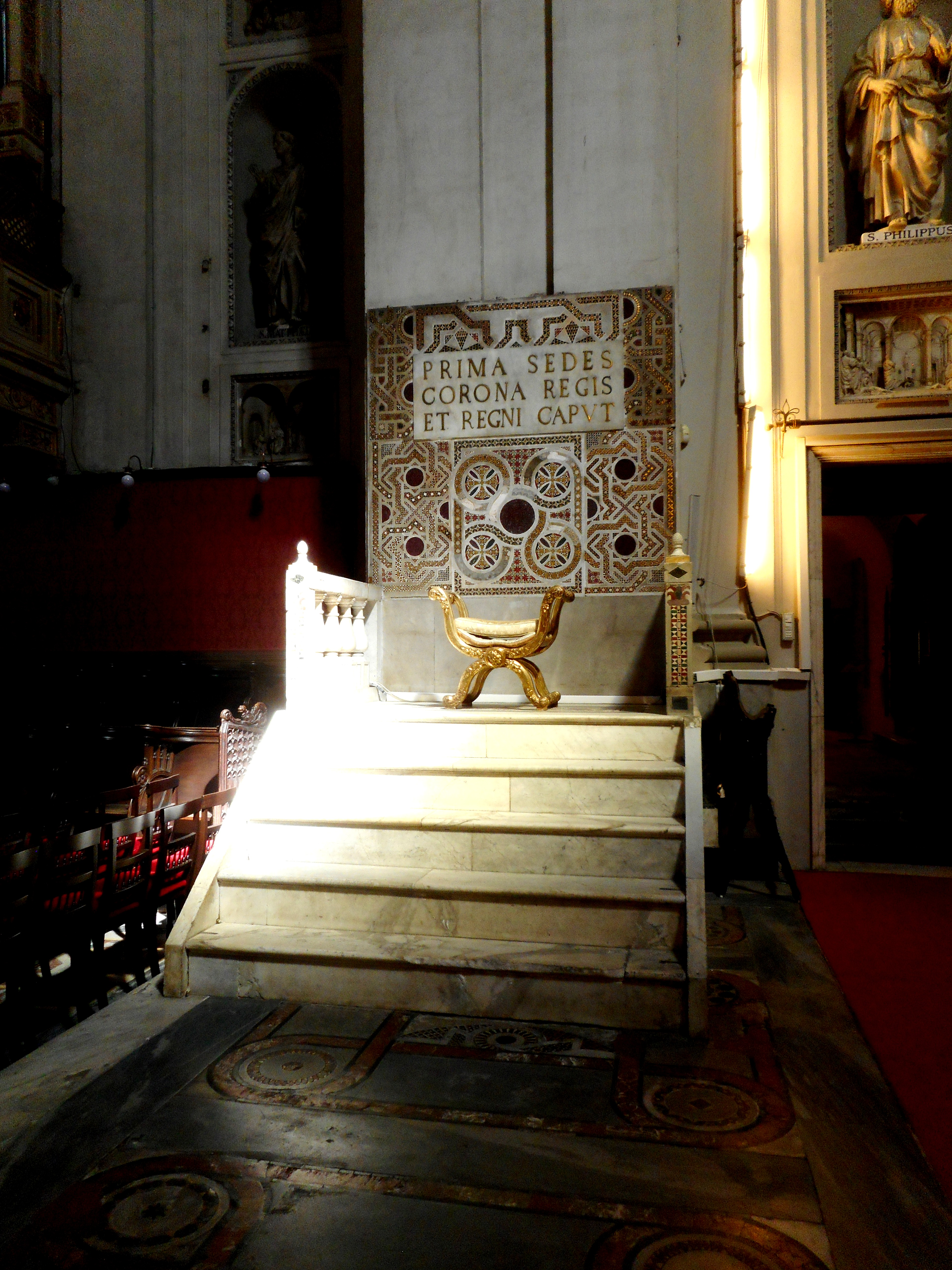 Baldacchino Reale, sito nel presbiterio della Cattedrale di Palermo dove veniva posto il trono del re